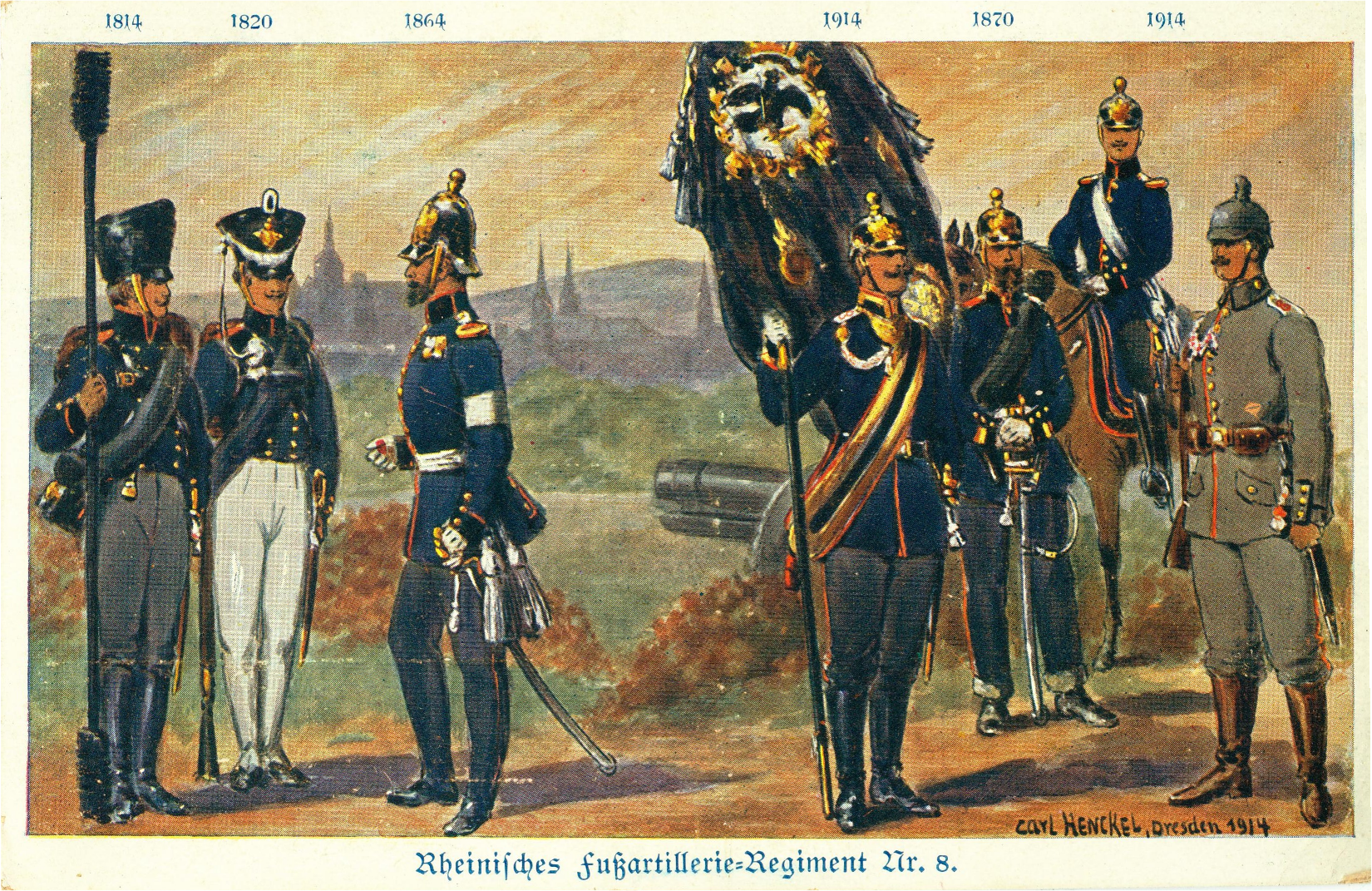 Fussartillerieregiment Nr. 8 von 1812 bis 1914